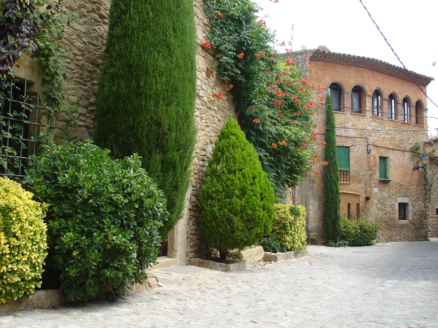 Peratallada (Girona, Catalunya, Espanya)